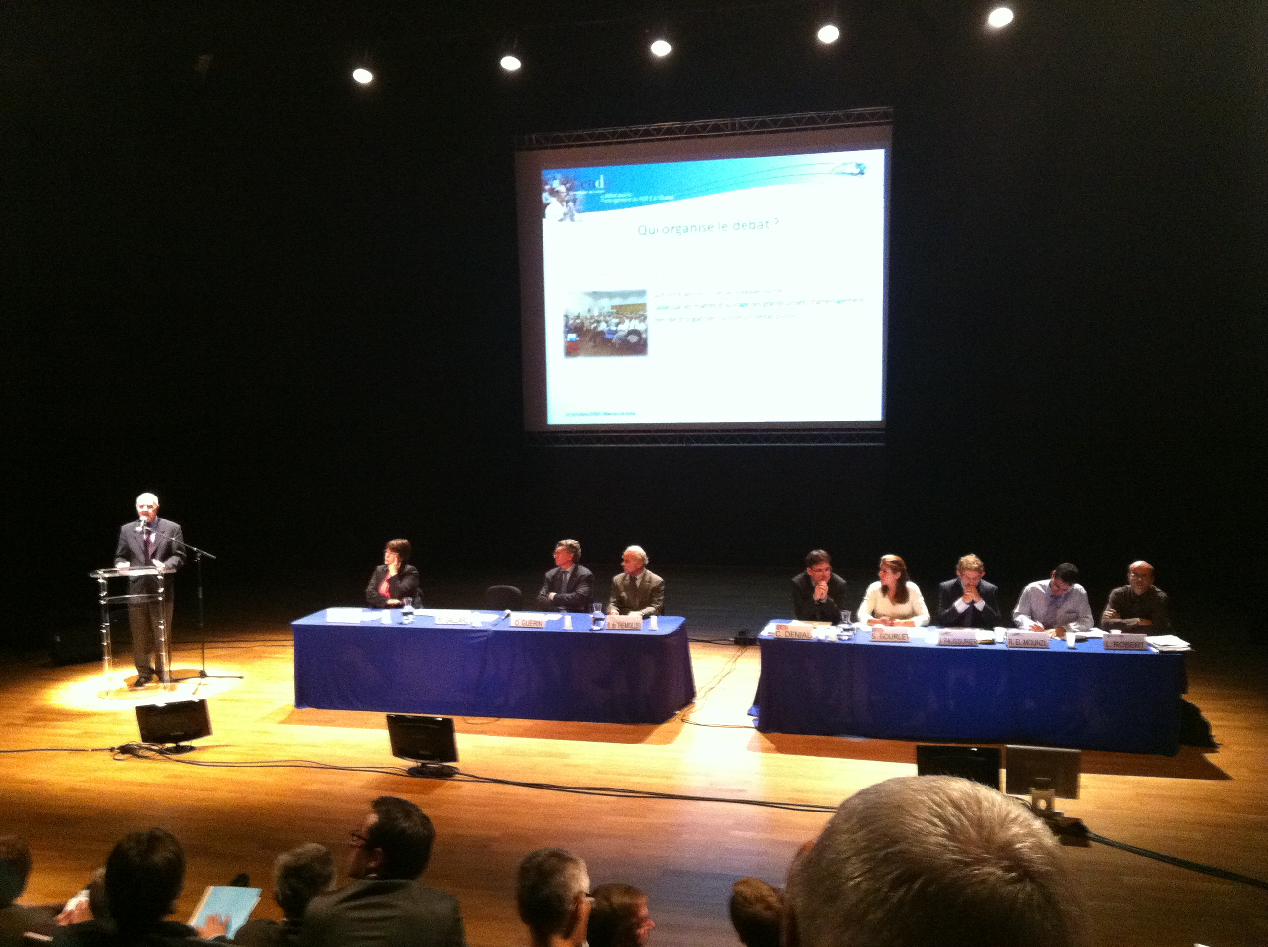 Réunion publique de la commission particulière du débat public sur le prolongement du RER E à l'ouest, Mantes-la-Jolie, 12 octobre 2010Au pupitre : Michel Gaillard, président de la commission particulière du débat public. Au centre : les membres de la commission particulière du débat public. A droite : les représentants du STIF, de RFF et de la SNCF.